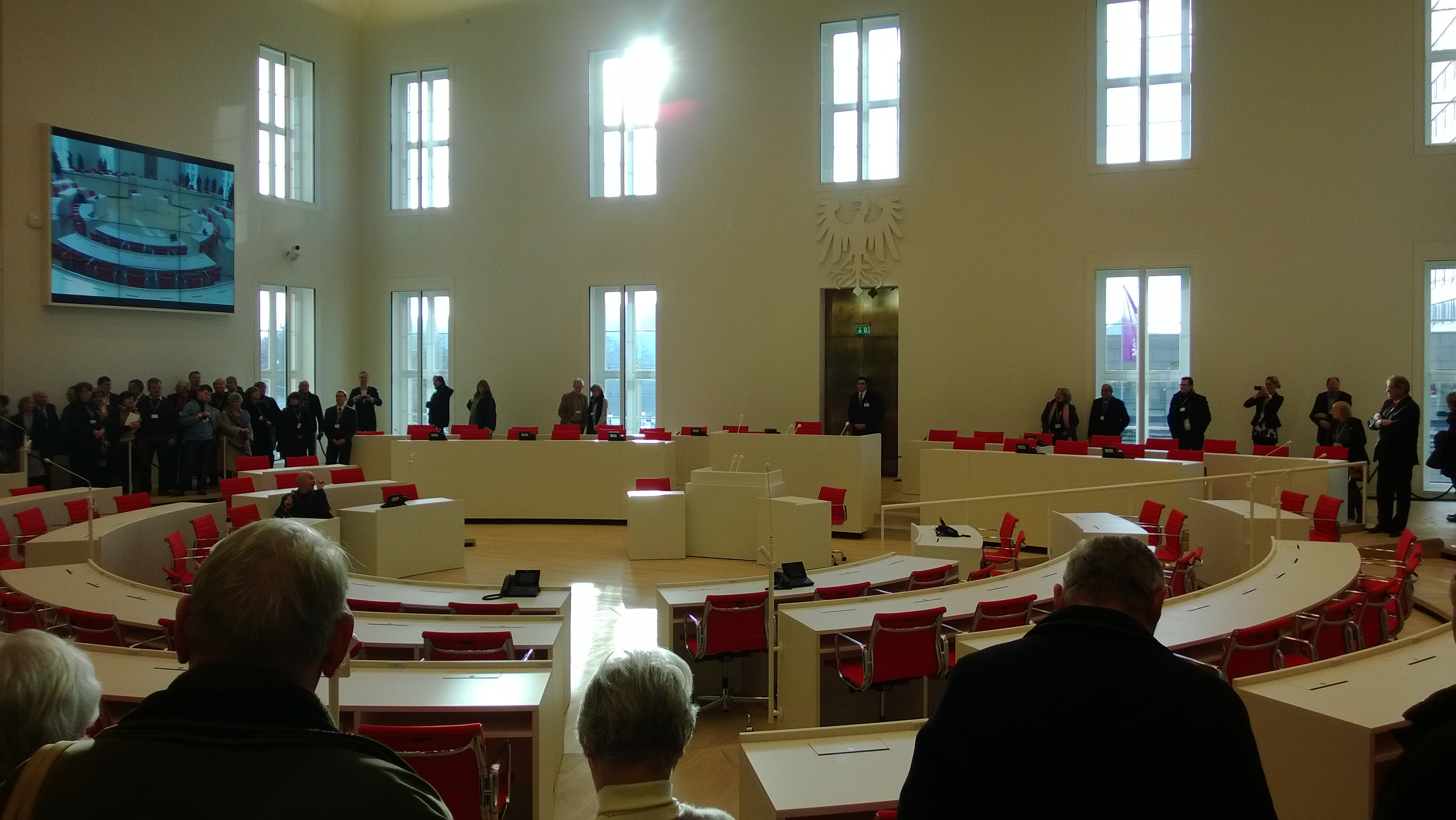 Auf diesem Bild ist der neue Plenarsaal des Brandenburger Landtags im Stadtschloss Potsdam zu sehen.